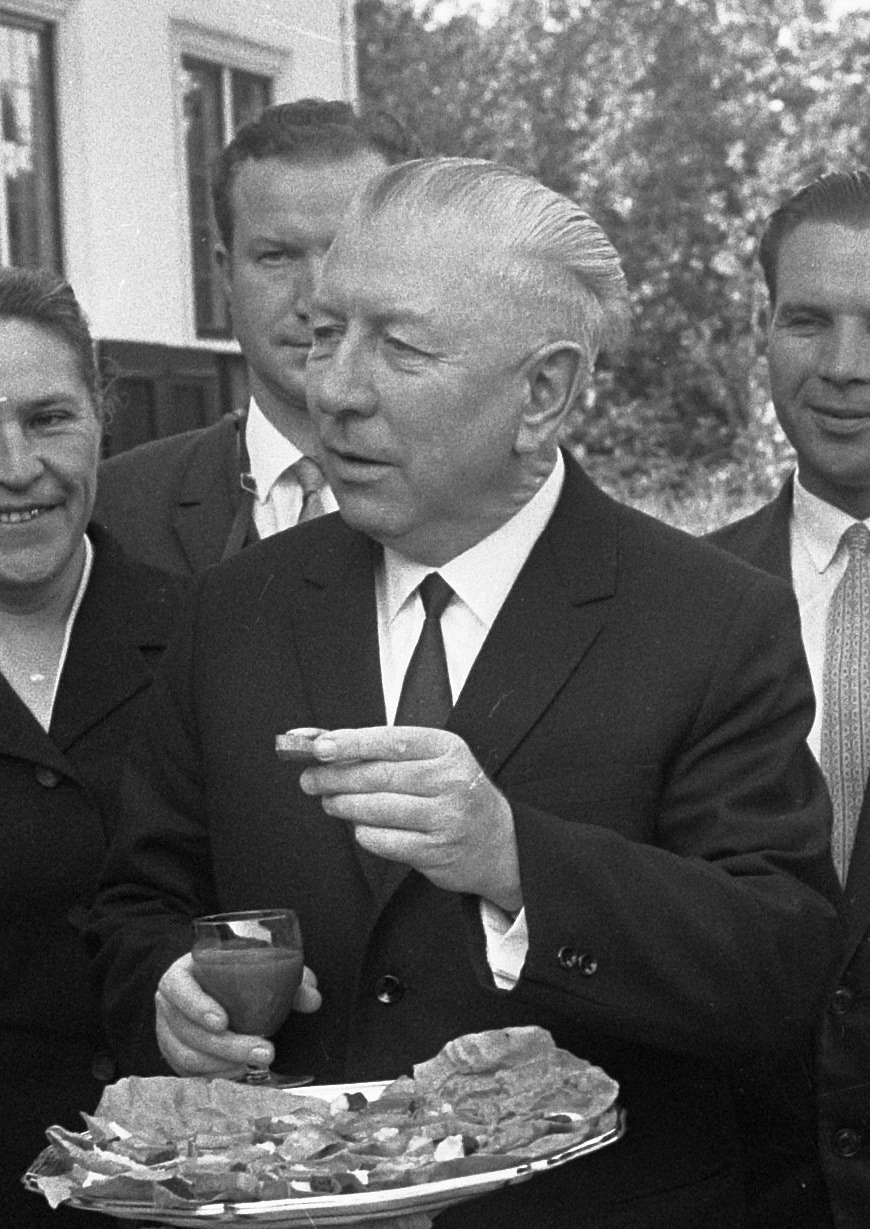 Russen te gast op Catshuis, rechts naast Cals de Russisch ambassadeur de heer Tougarinov